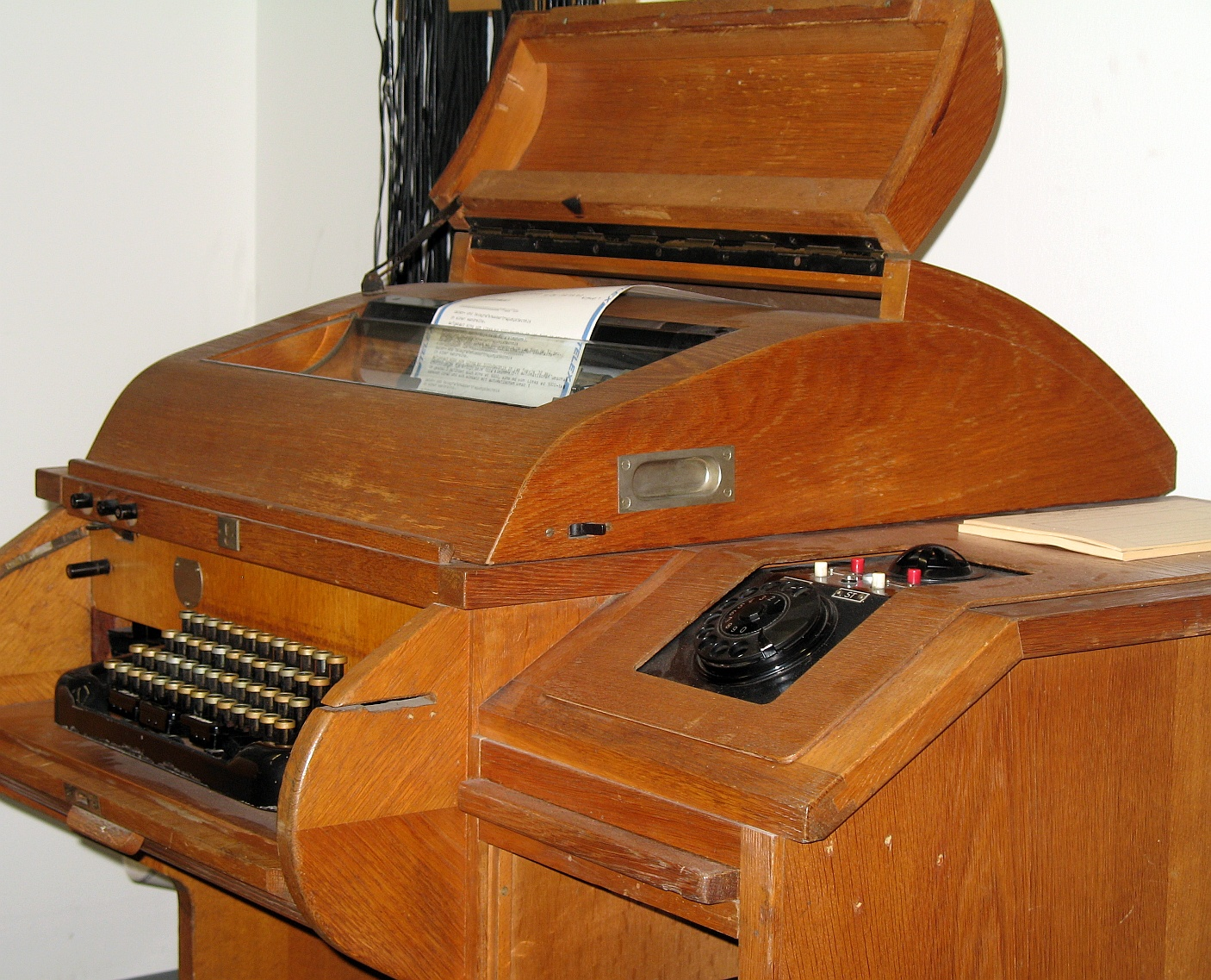 (Blatt-) Fernschreiber T 37 (Siemens) im Fernmeldemuseum Aachen